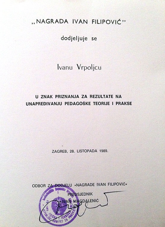 Nagrada "Ivan Filipović" koju je 1989. godine dobio Ivan Vrpoljac za rezultate na unapređivanju pedagoške teorije i prakse